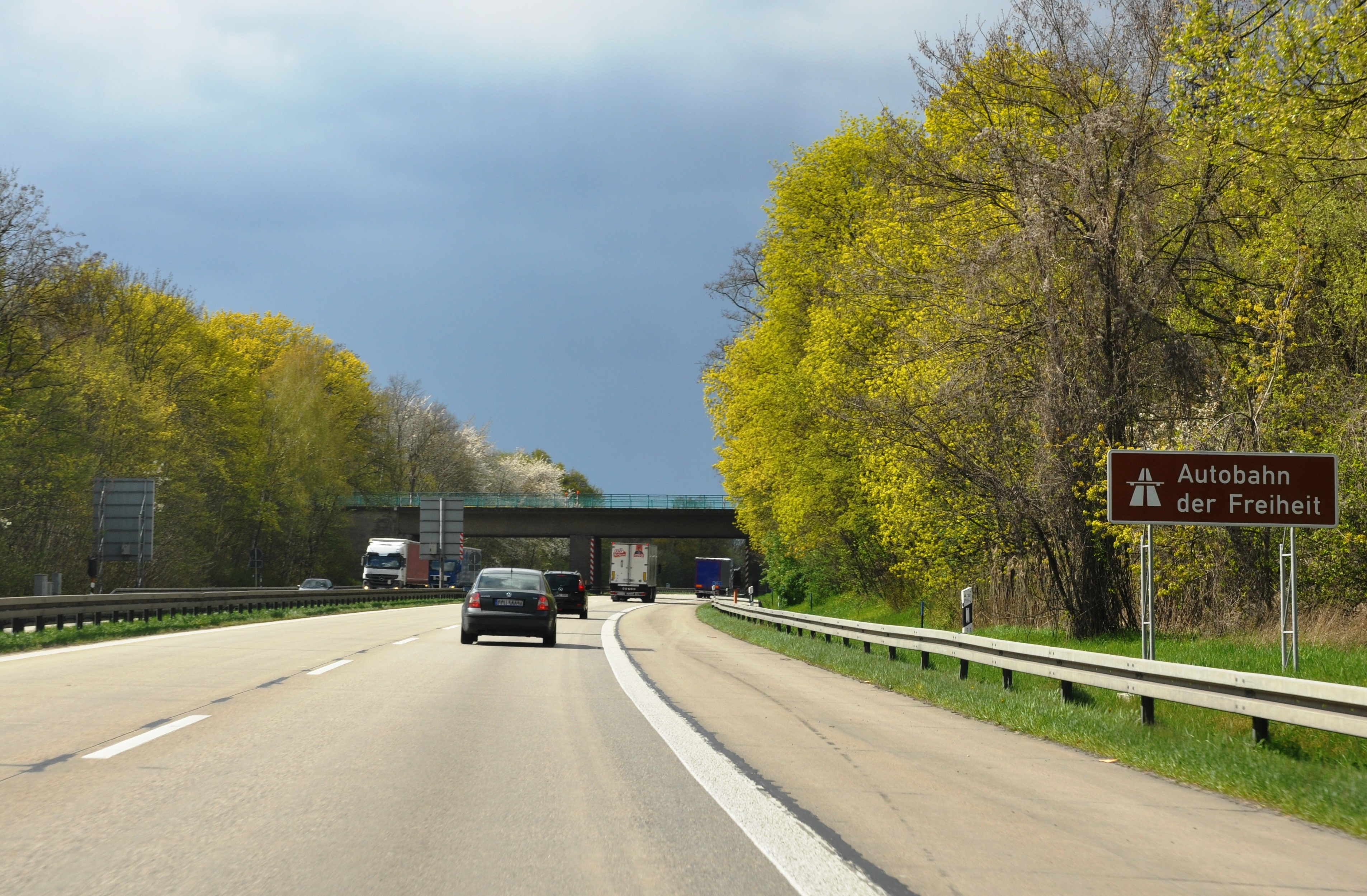 Autoroute de la Liberté en Allemagne